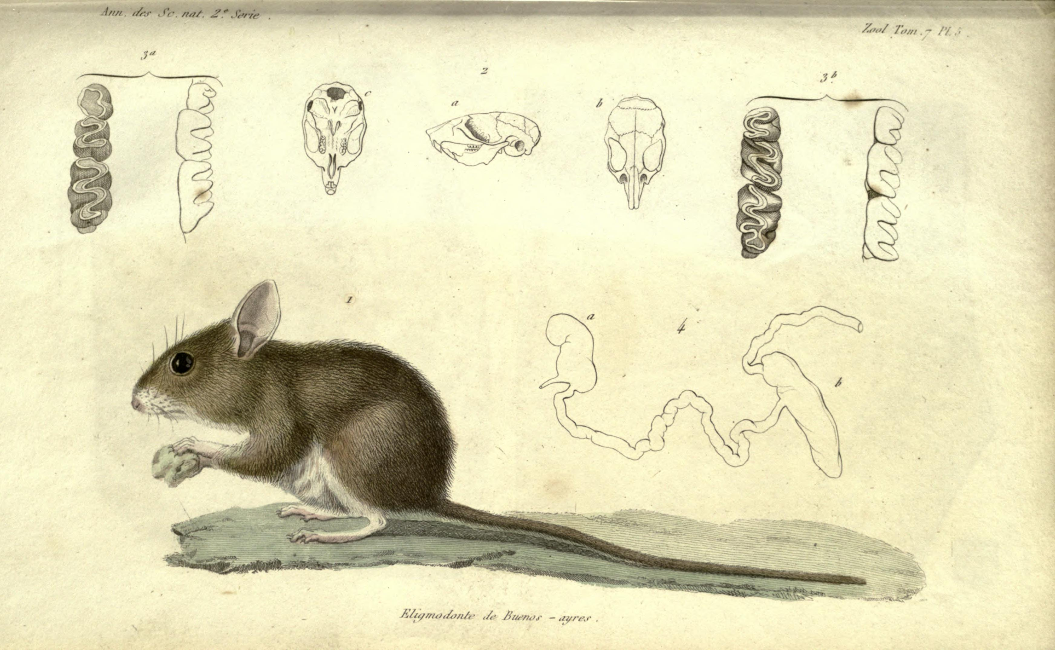 Annales des sciences naturelles